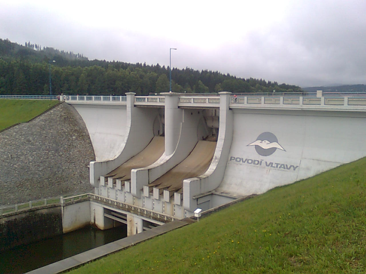 Lipno